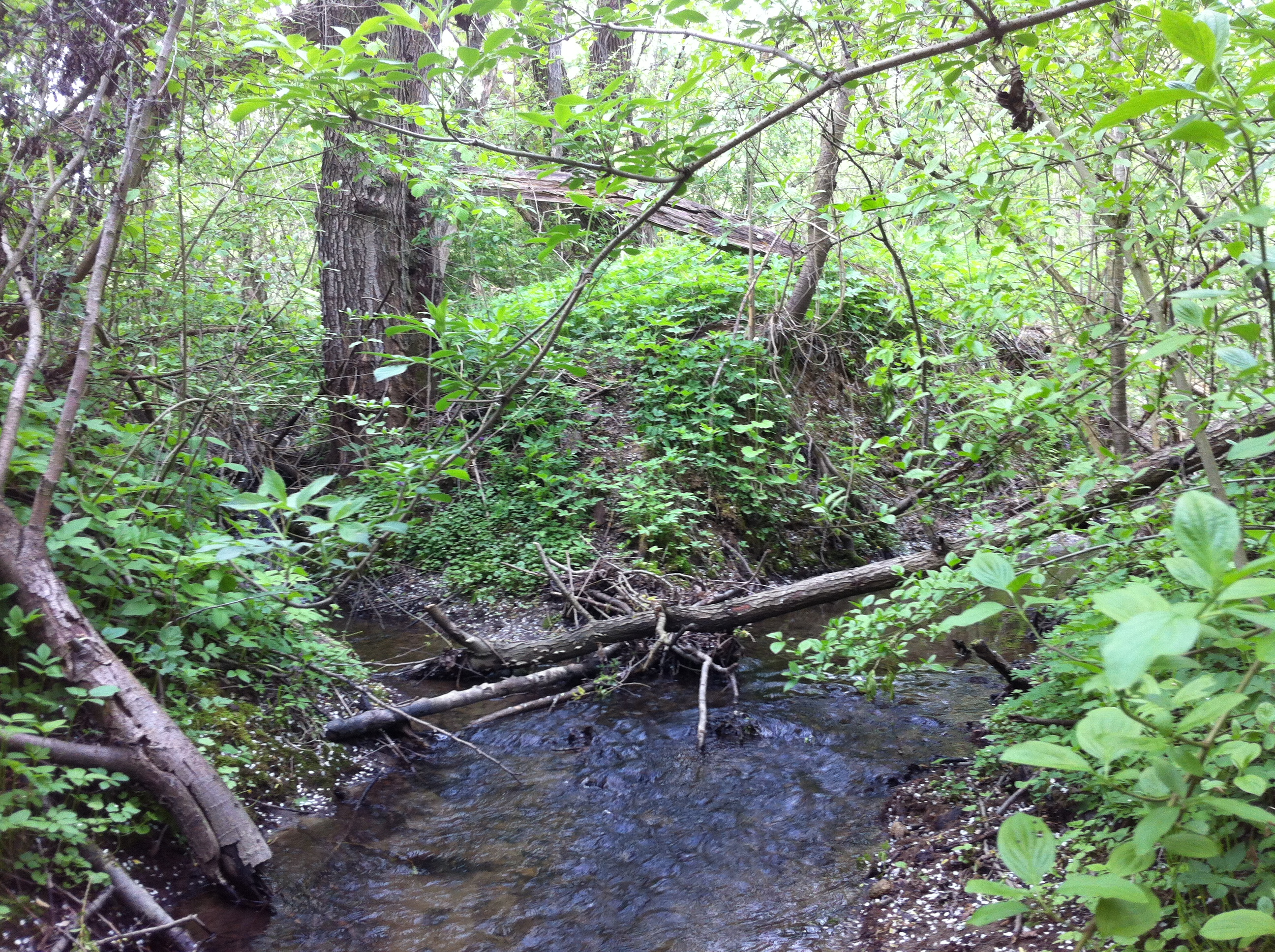 sútok Slivnice a Slivničky